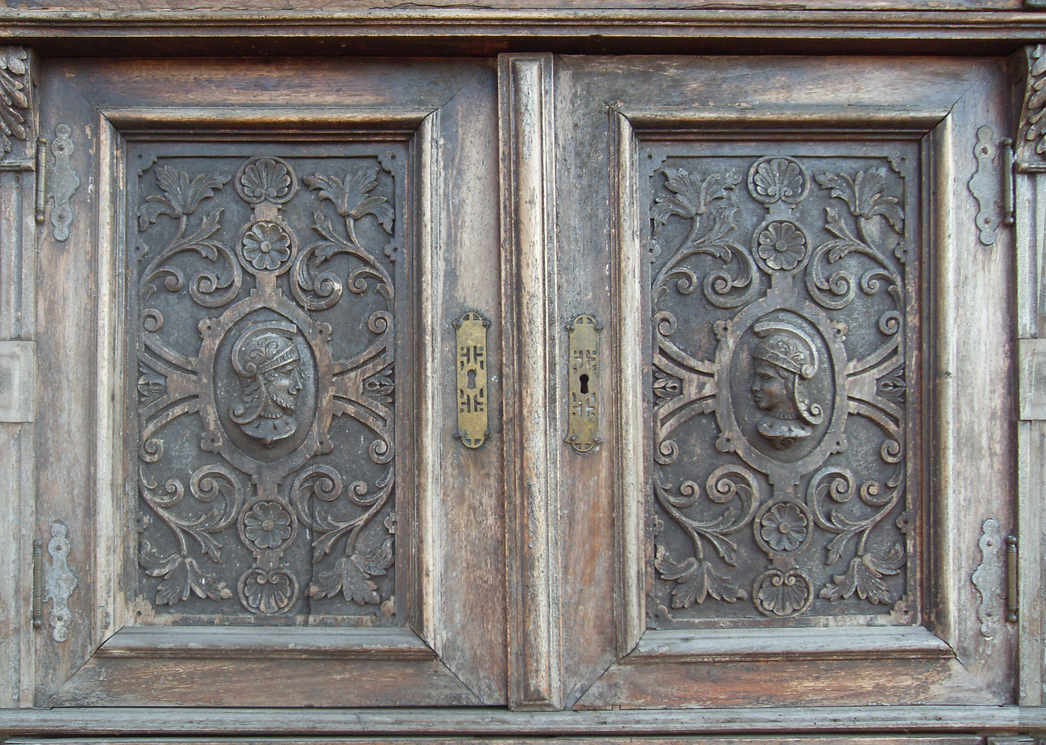 Київський музей вторсировини, елемент декору шафи.